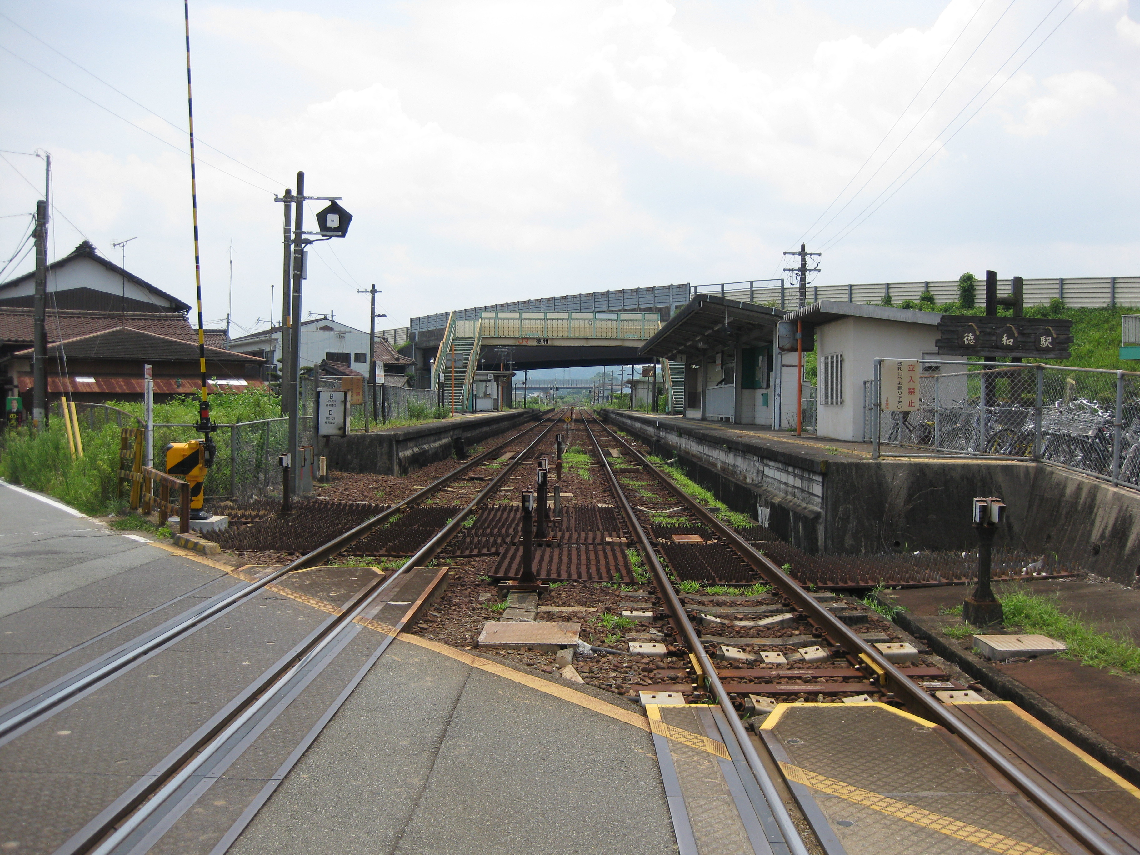 徳和駅を北側の踏切から